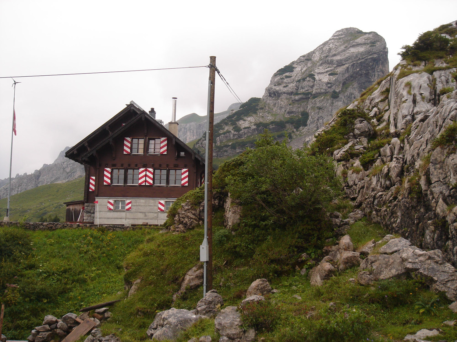 Lidernenhütte UR, Schweiz: 2006